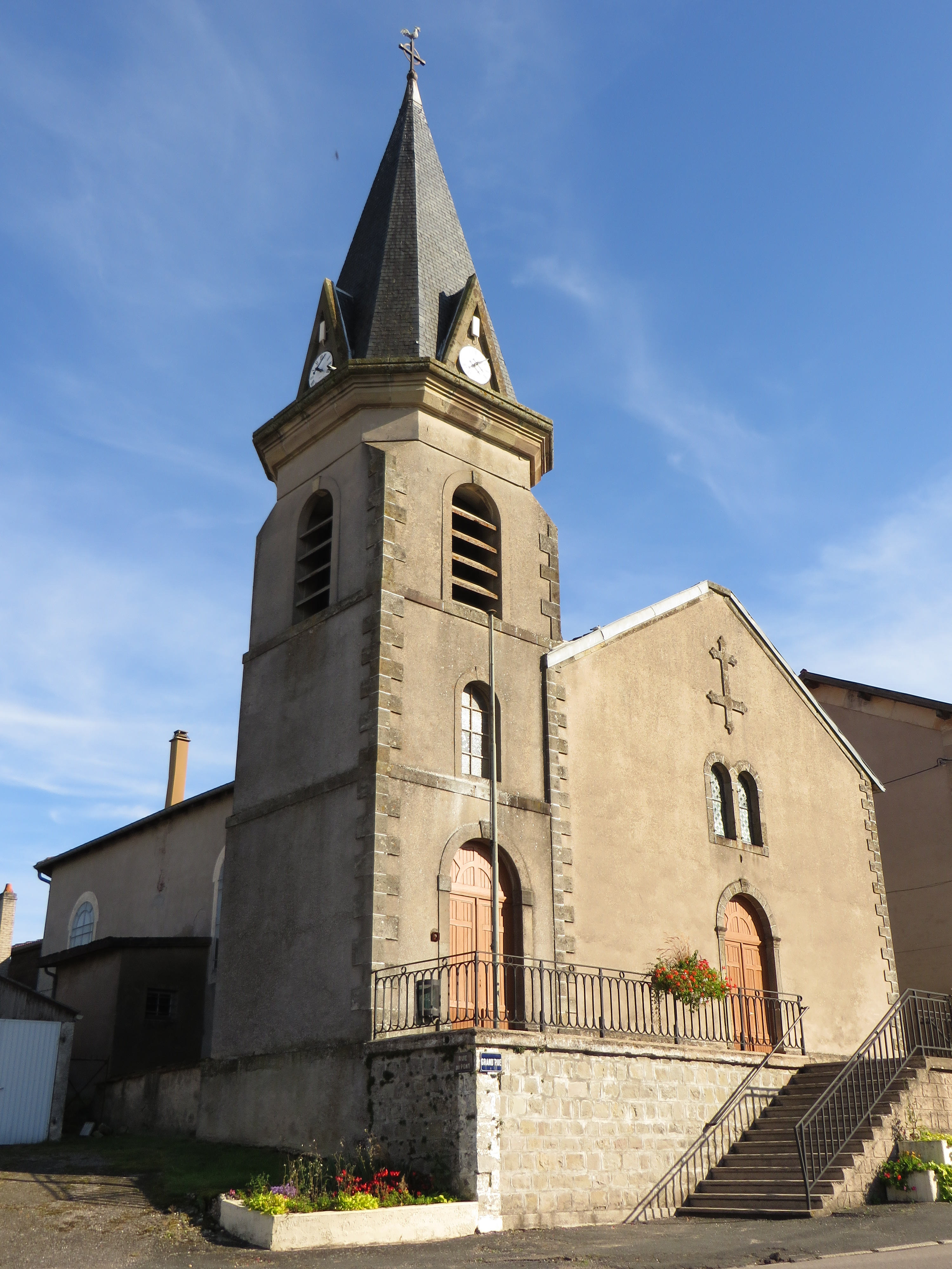 Avricourt 54 eglise